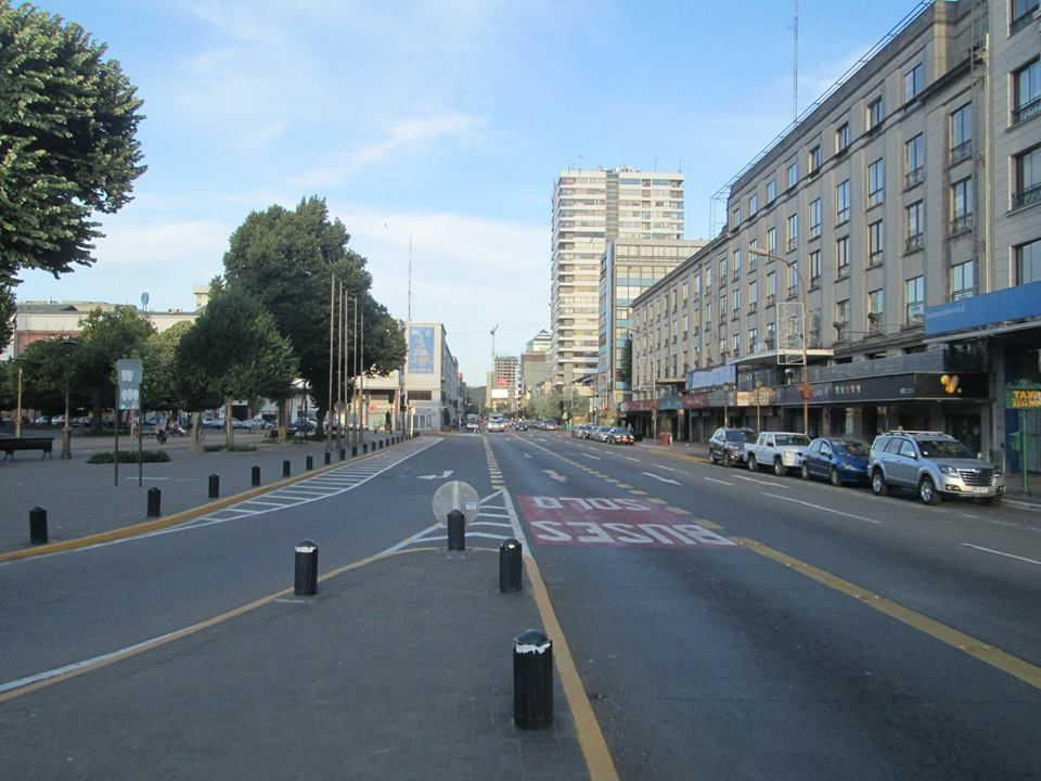 Concepcion vista desde Avenida O´Higgins con Caupolicán.